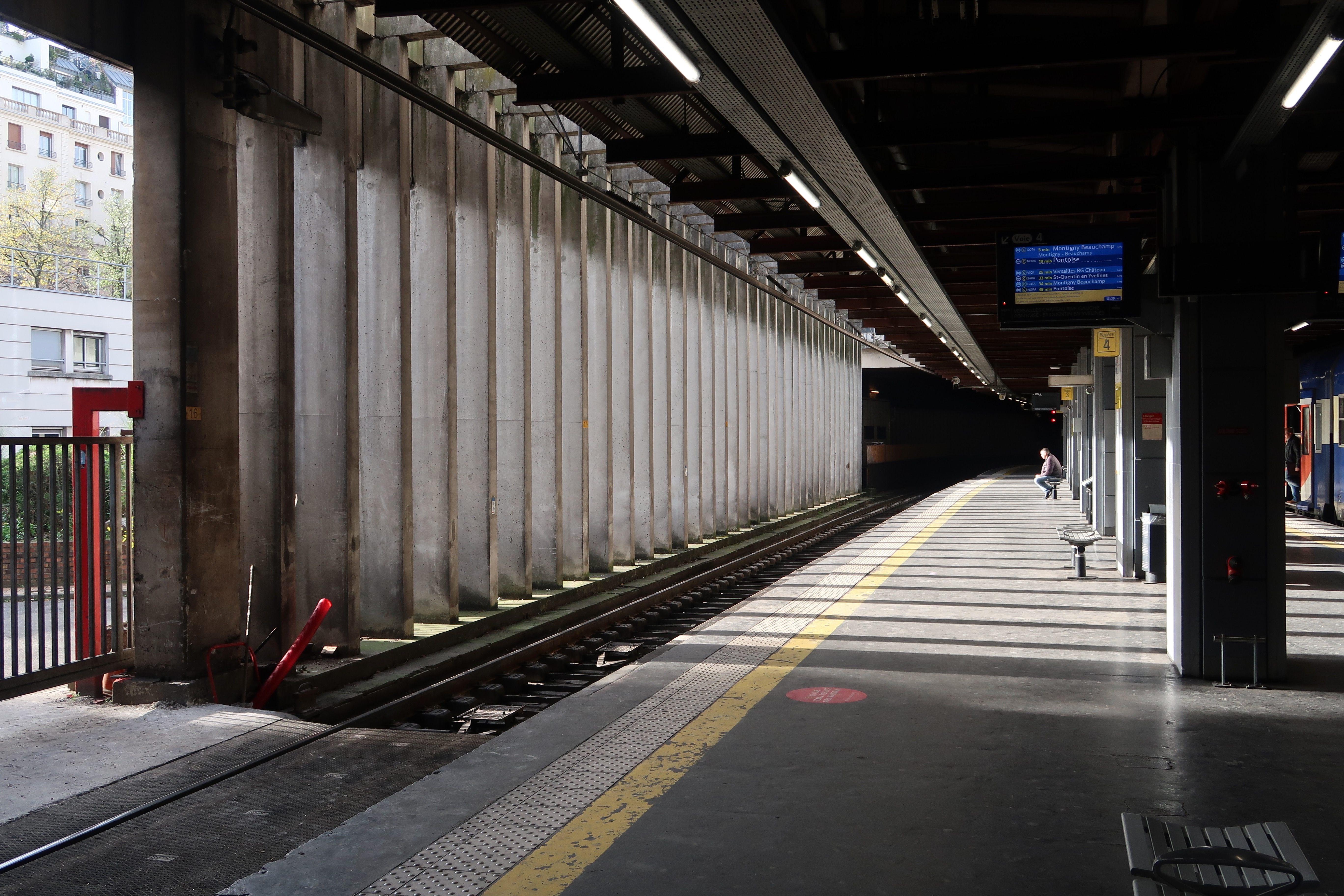 Quais de la gare des Invalides (Paris, 7e).